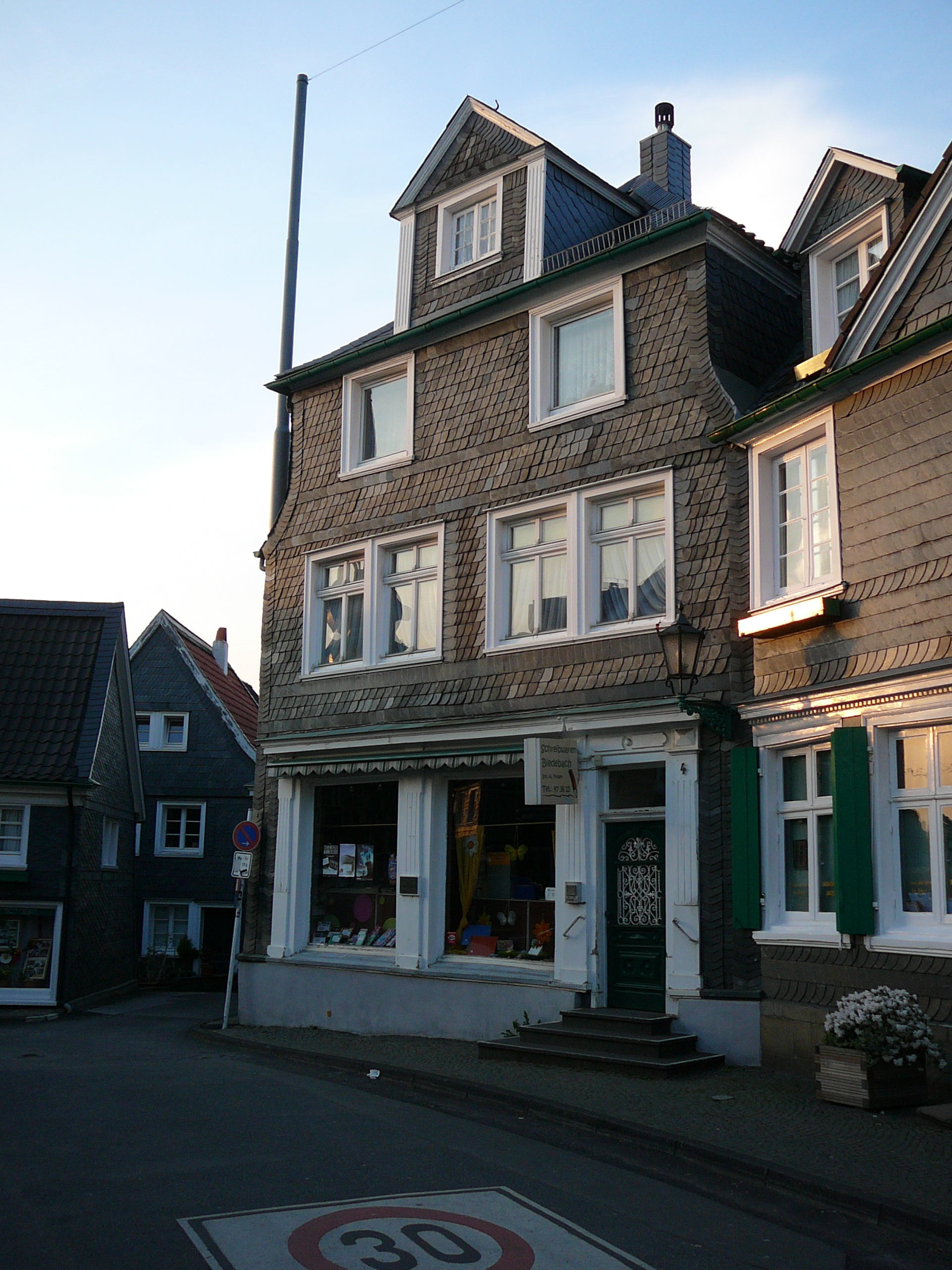 Hütter Str, Wuppertal